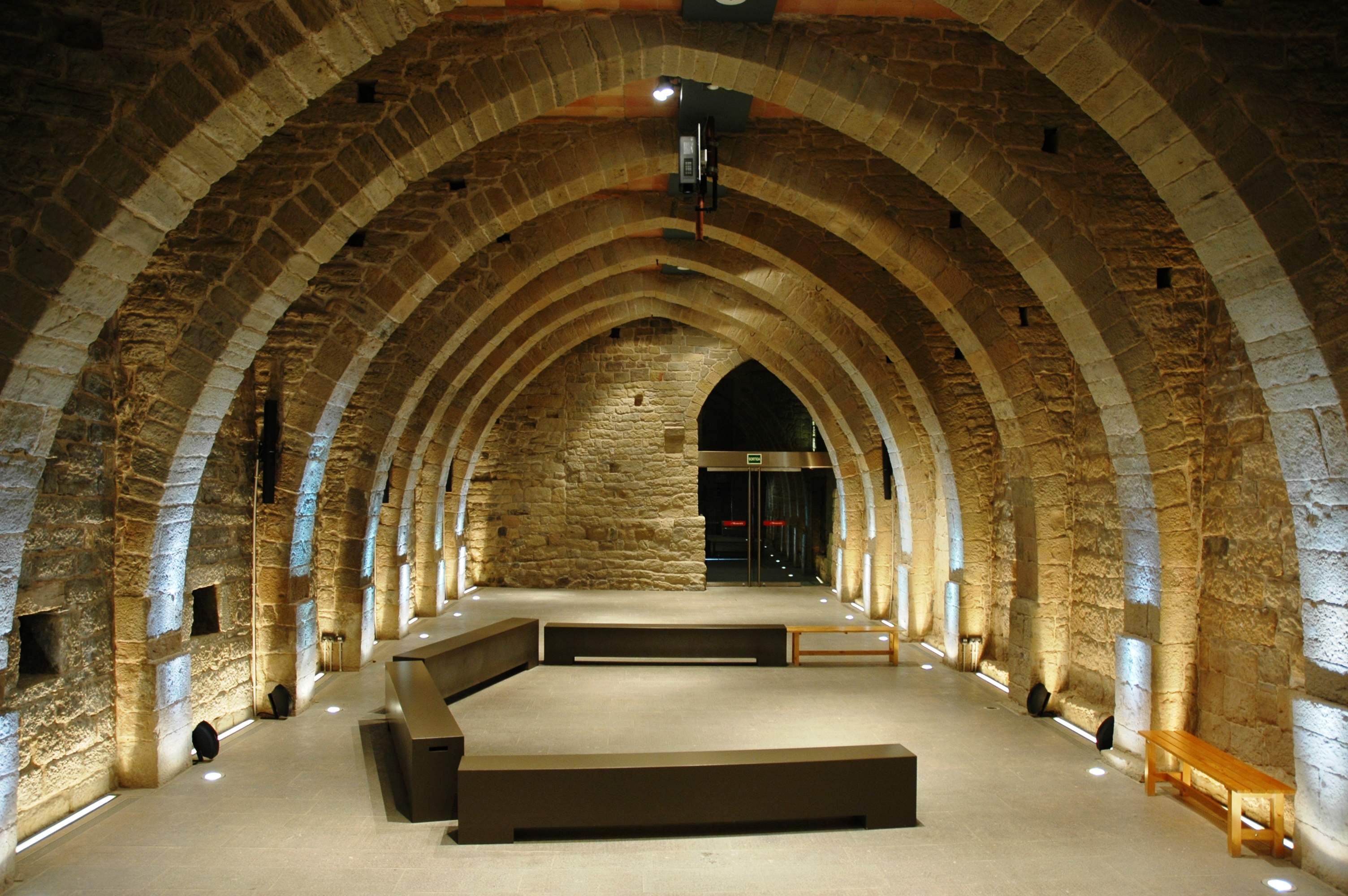 Sant Benet de Bages - Celler